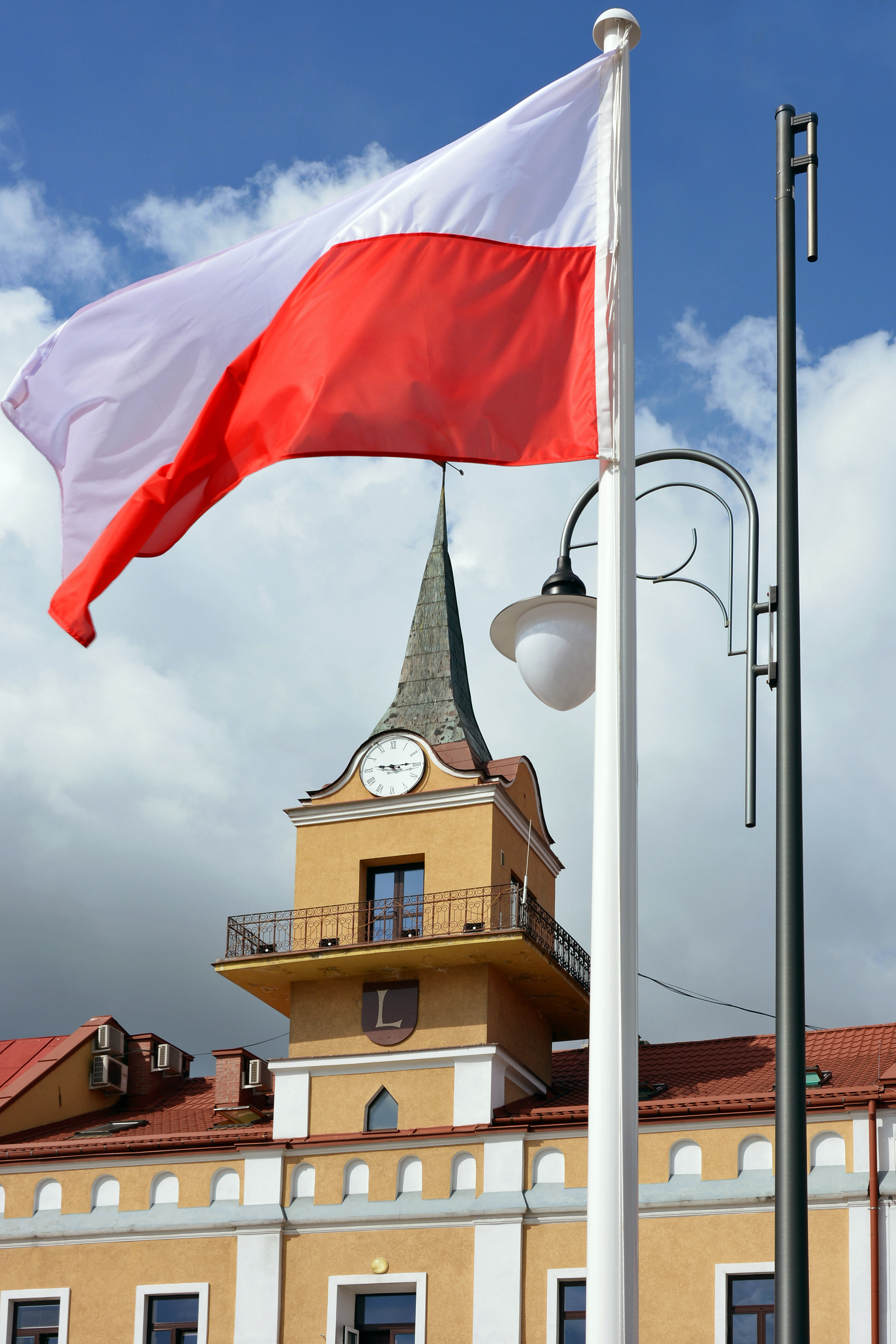 Urząd Miejski oraz Urząd Gminy Miejskiej Lubaczów